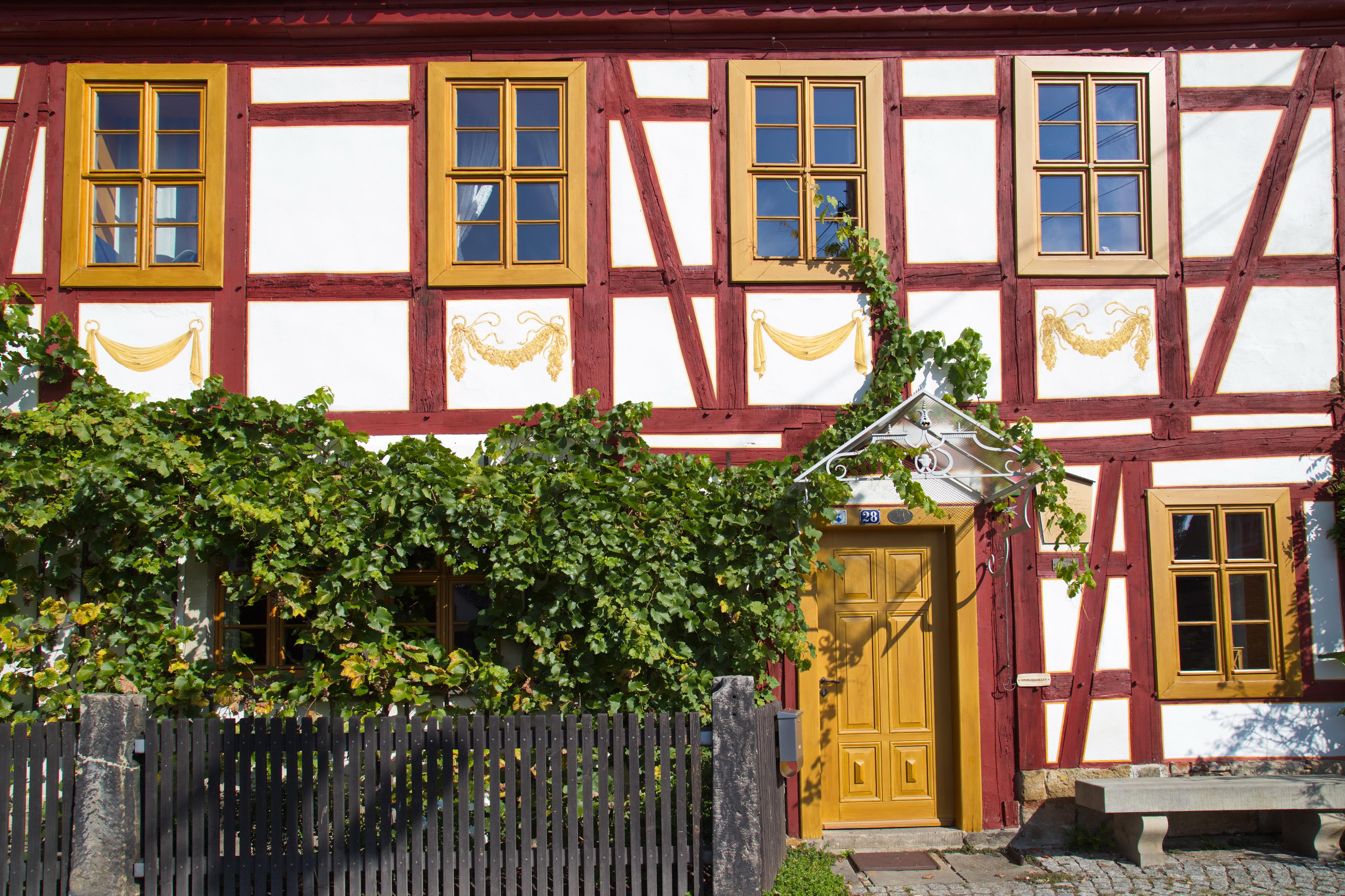 Radebeul, Weinbergstraße 28, Haus Lorenz, Teilansicht